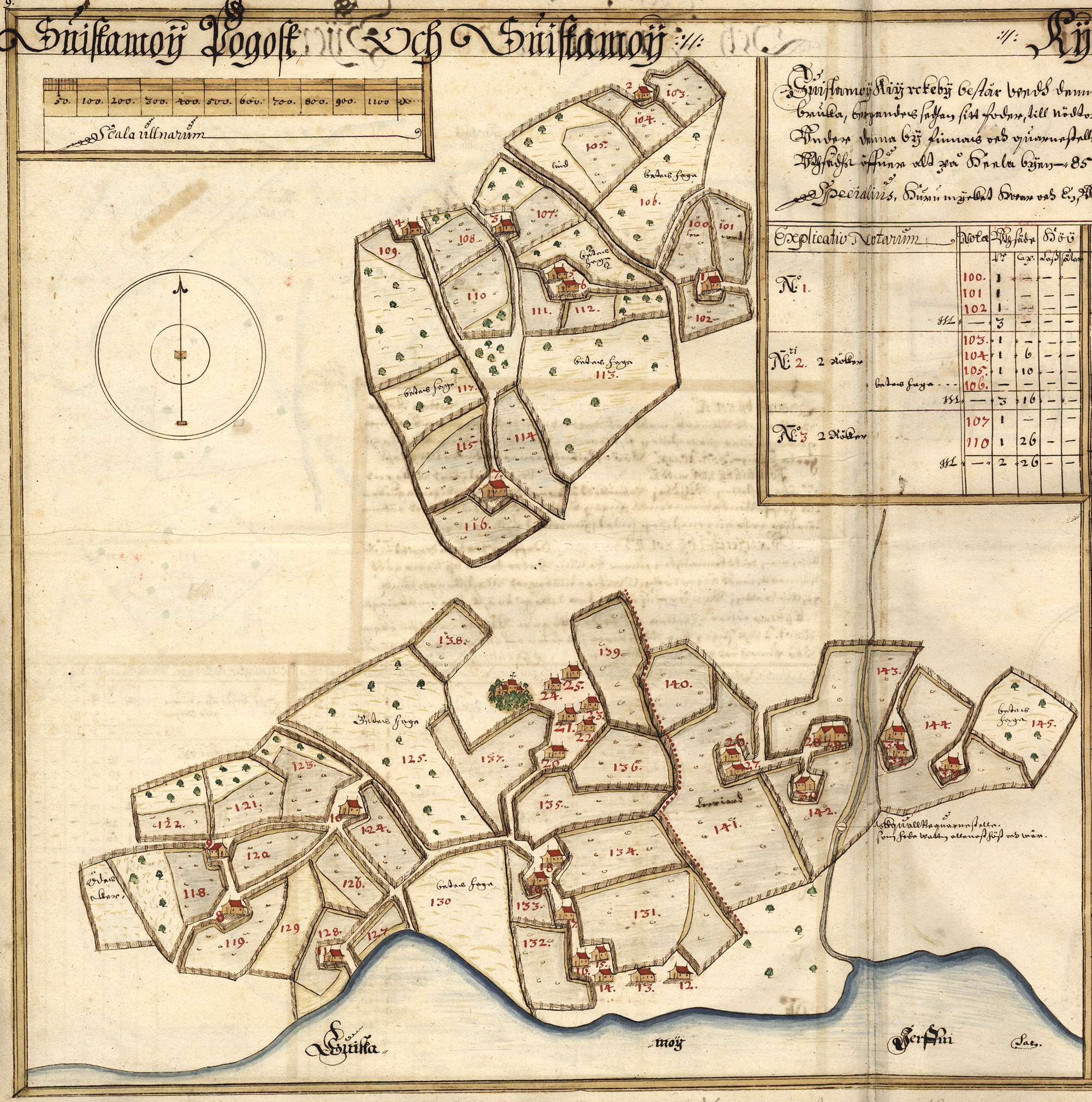 Суйстамо